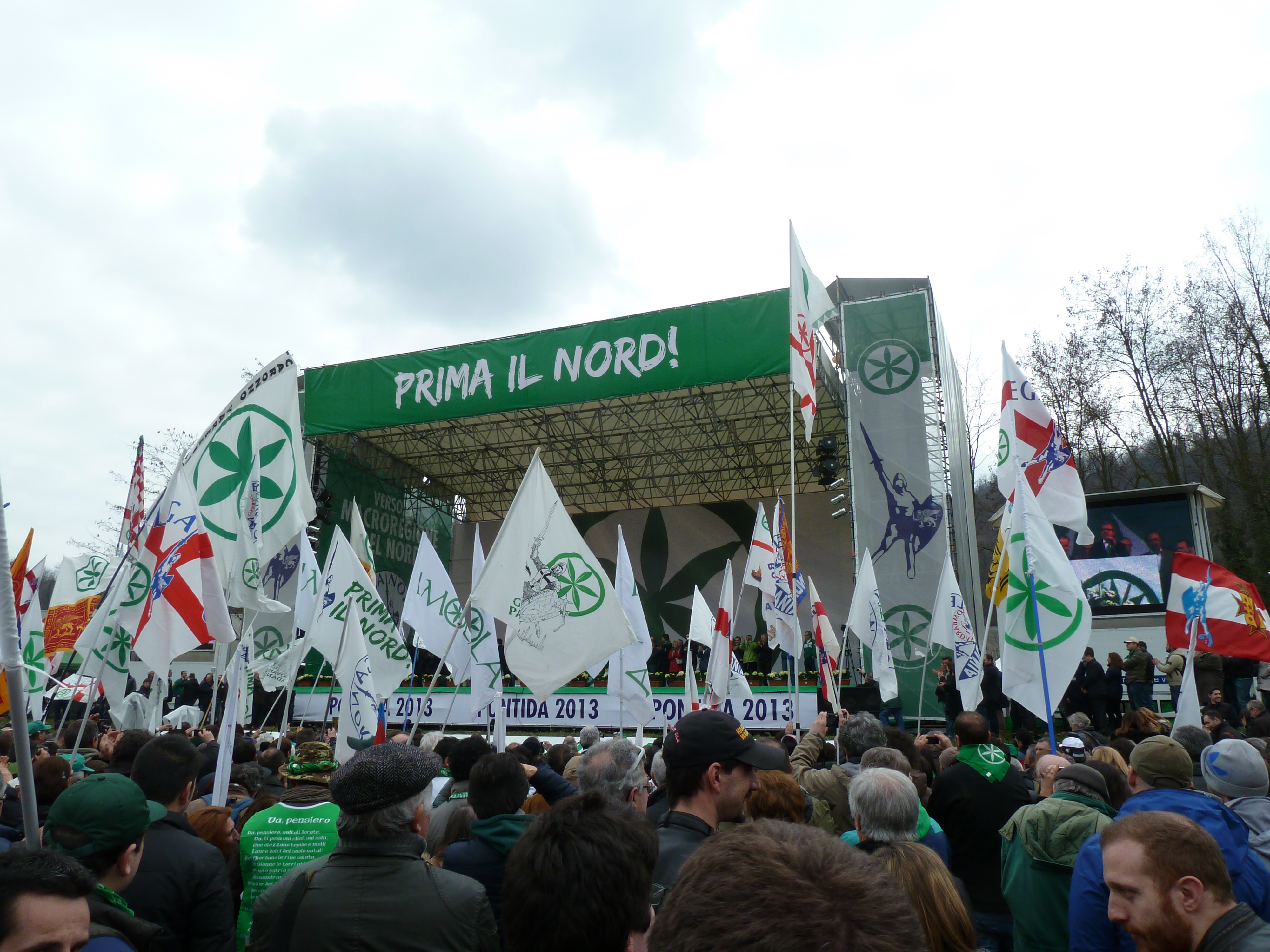 Foto dal raduno della Lega Nord a Pontida ad aprile 2013.